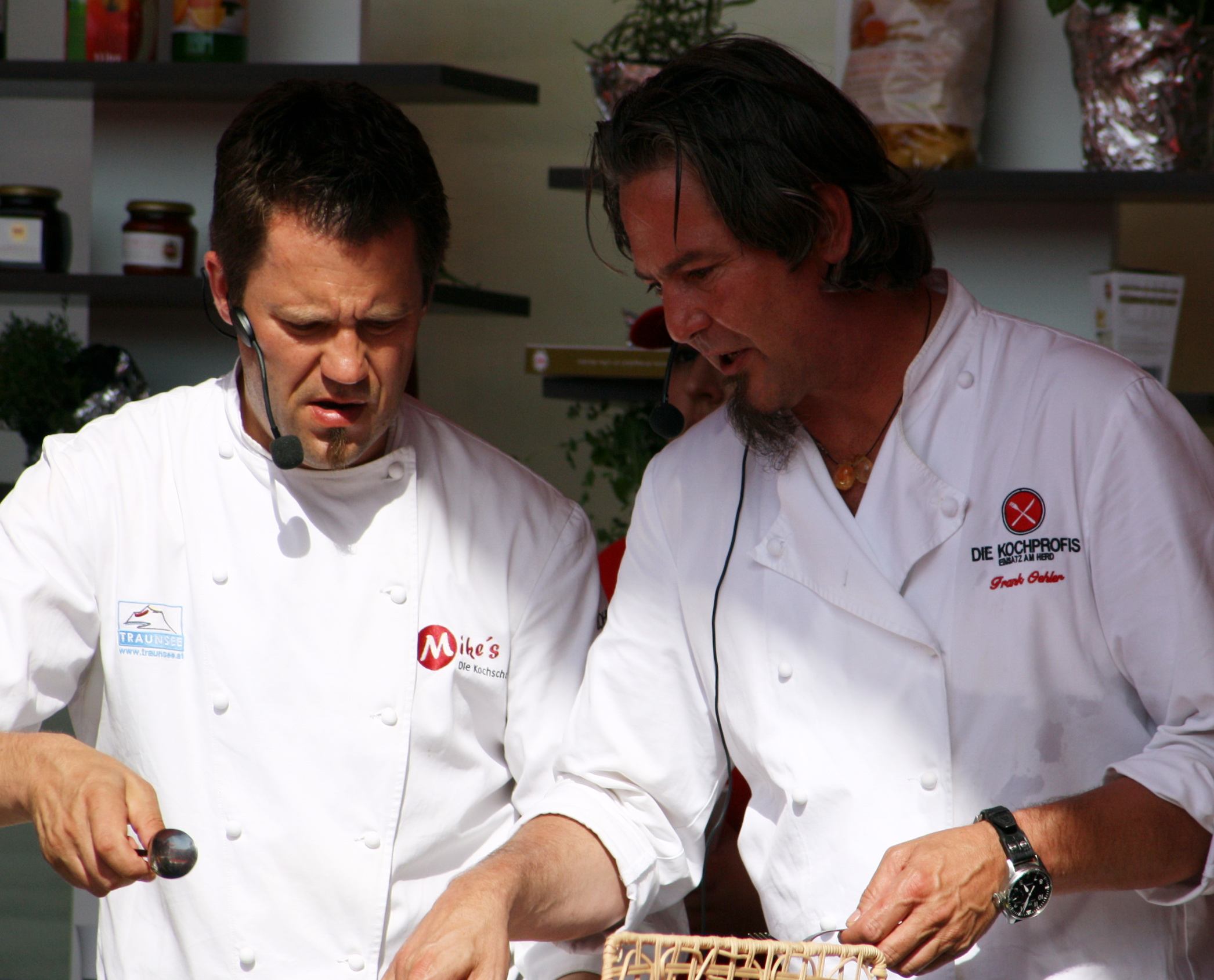 Mike Suesser und Frank Oehler auf der Theresienwiese in München beim REWE Fest Happy Family